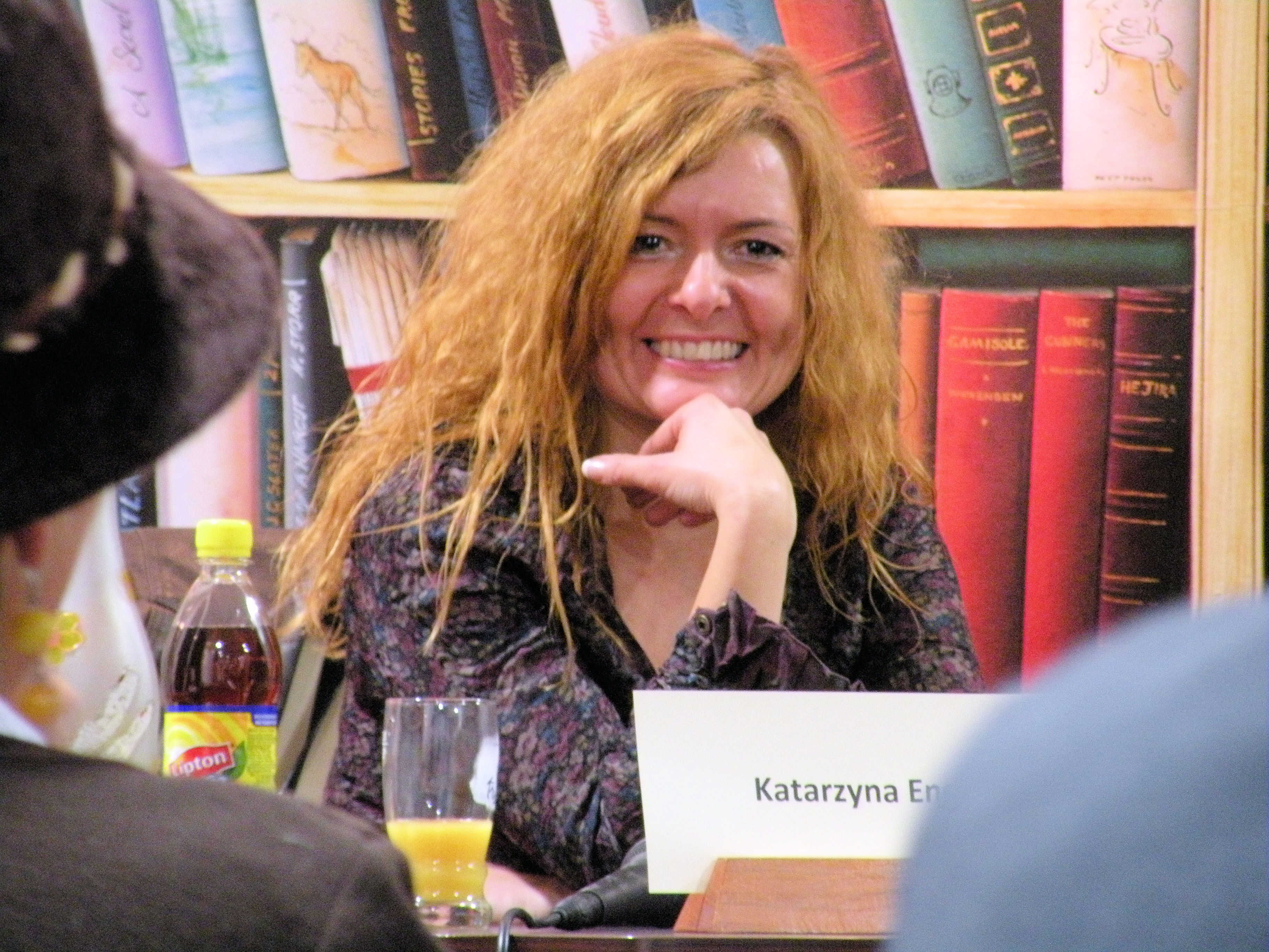 Katarzyna Enerlich na spotkaniu autorskim w Kawiarni Literackiej i Filmowej, Olsztyn, 2011.